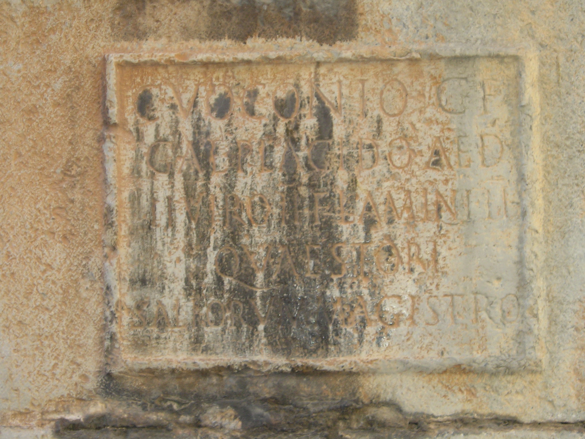 Epitafio romano reutilizado en la parte central de la escalera de la Iglesia de Santa María de Sagunto (Valencia, España) correspondiente a la inscripción CIL II2/14, 365, cuyo texto dice: C (aio) VOCONIO C (ai) F (ilio) / GAL (eria) Plácido AED (ili) / IIVIRO II Flamini II / QVAESTORI / SALIORVM Magistro.